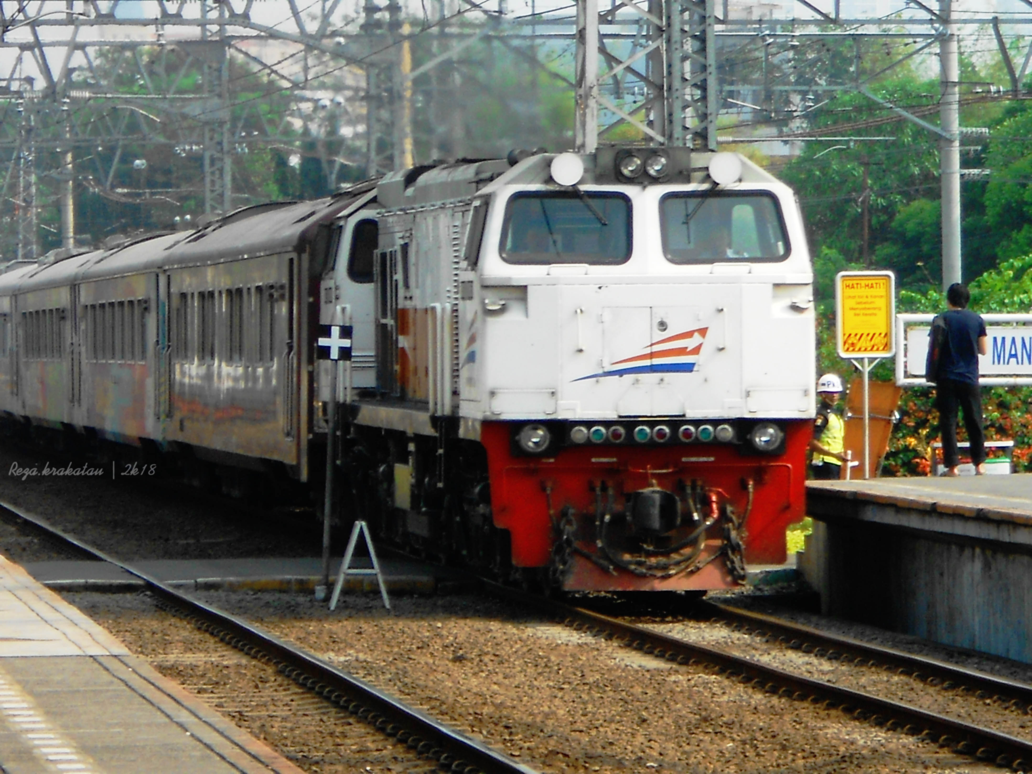 Argo parahyangan ka 22r melintas langsung stasiun manggarai